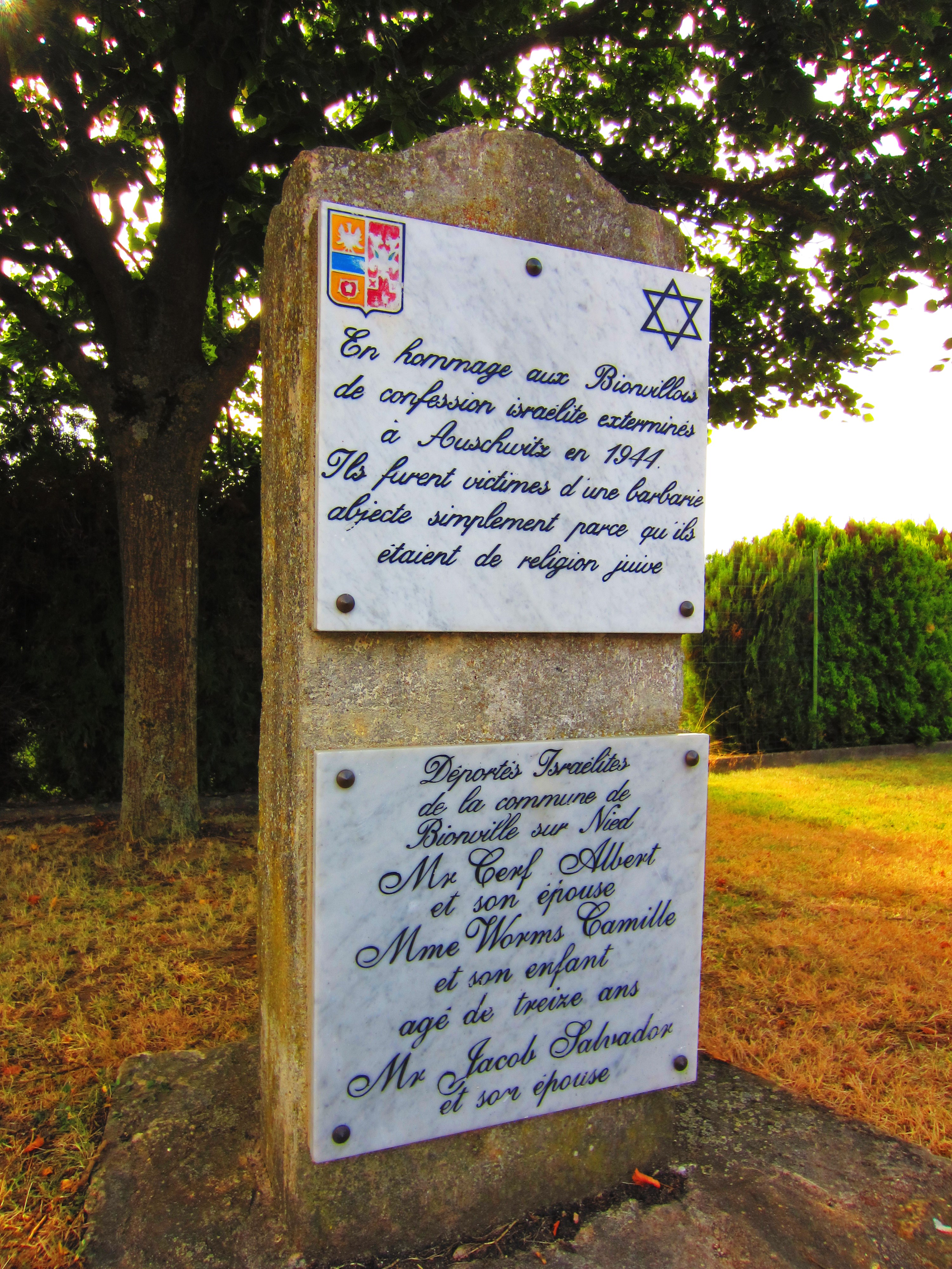 Stele synagogue Bionville Nied